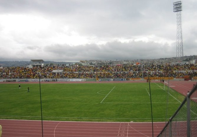 Ultimo partido de Sociedad Deportiva Aucas en Ibarra en donde hubo cerca de 17.000 personas las cuales más de 12.000 eran simpatizantes de Aucas